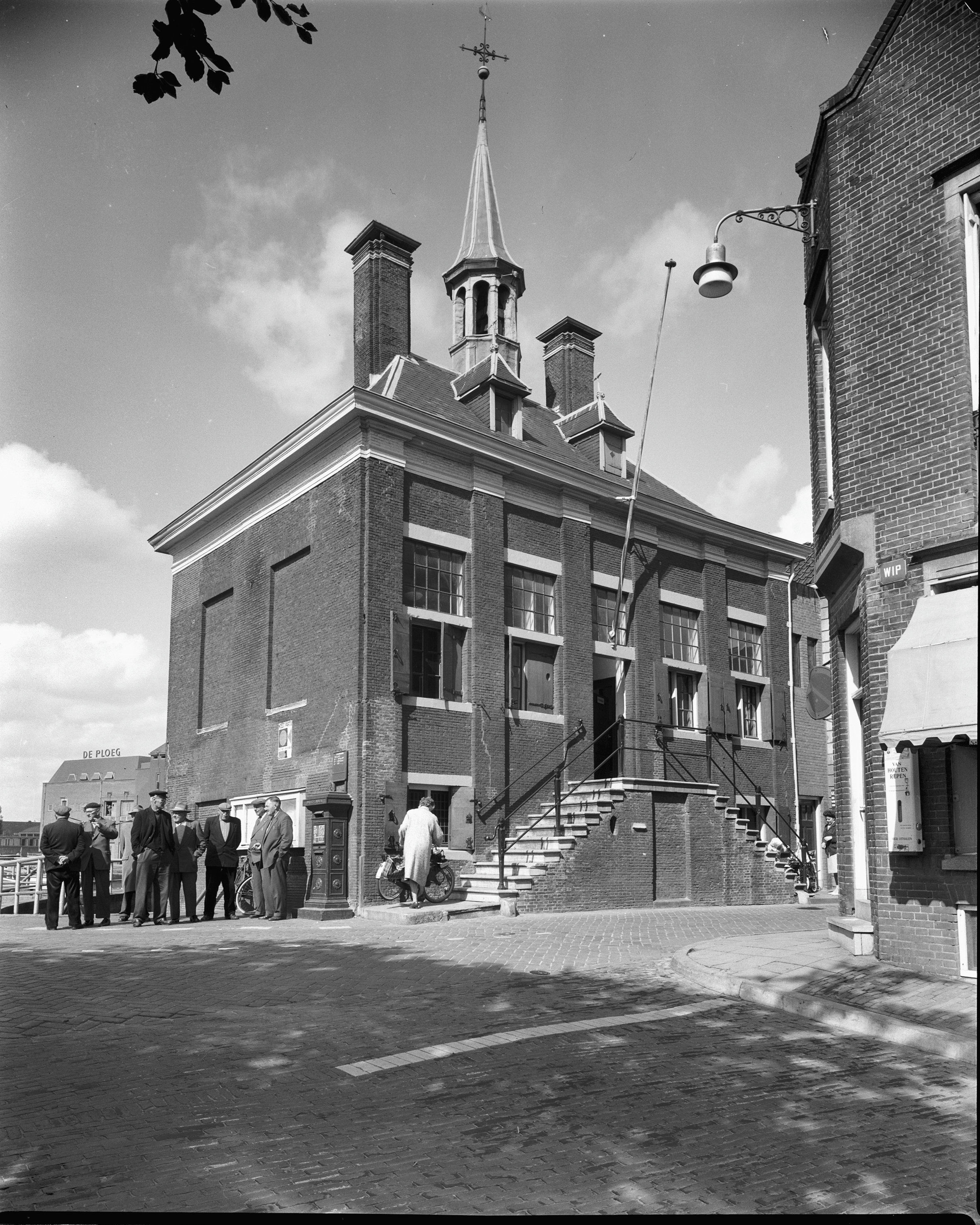 Raadhuis: voorgevel